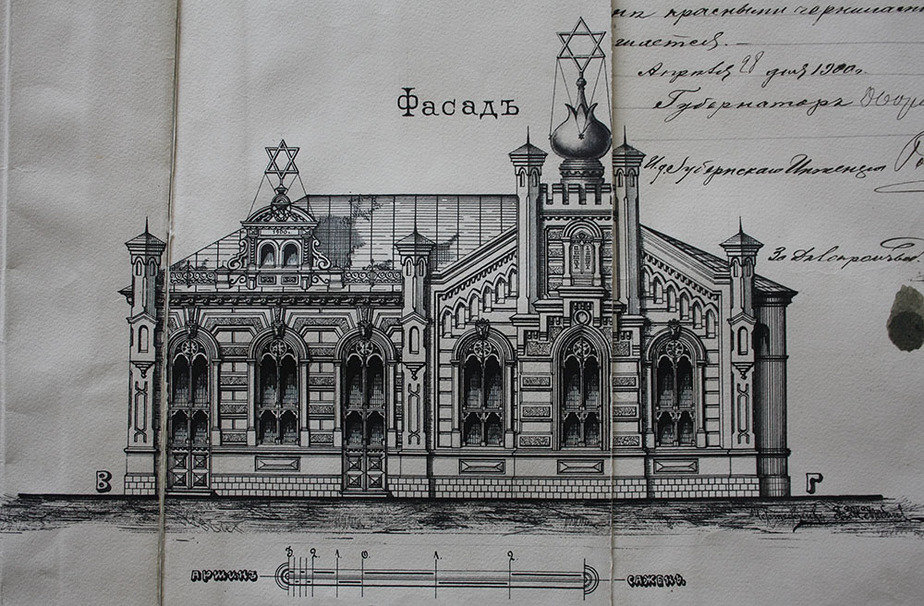 Праектны рысунак малітоўні Хеўра-Алшых, 1900 г.